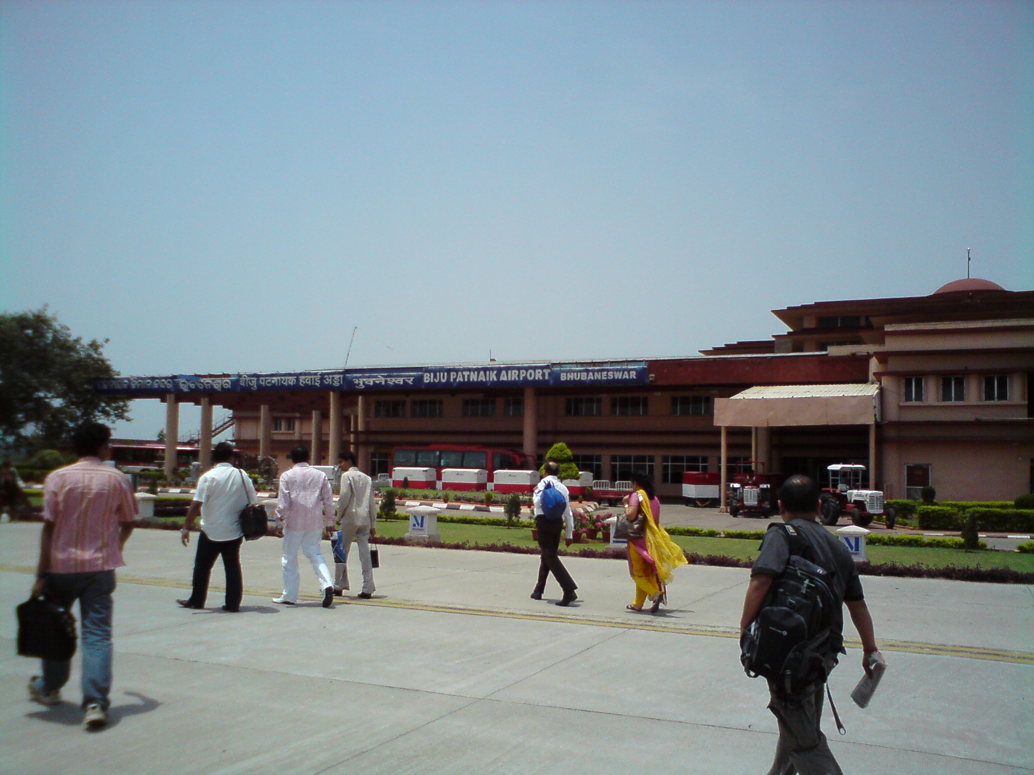 Biju Patnaik Airport Terminal - Airside view